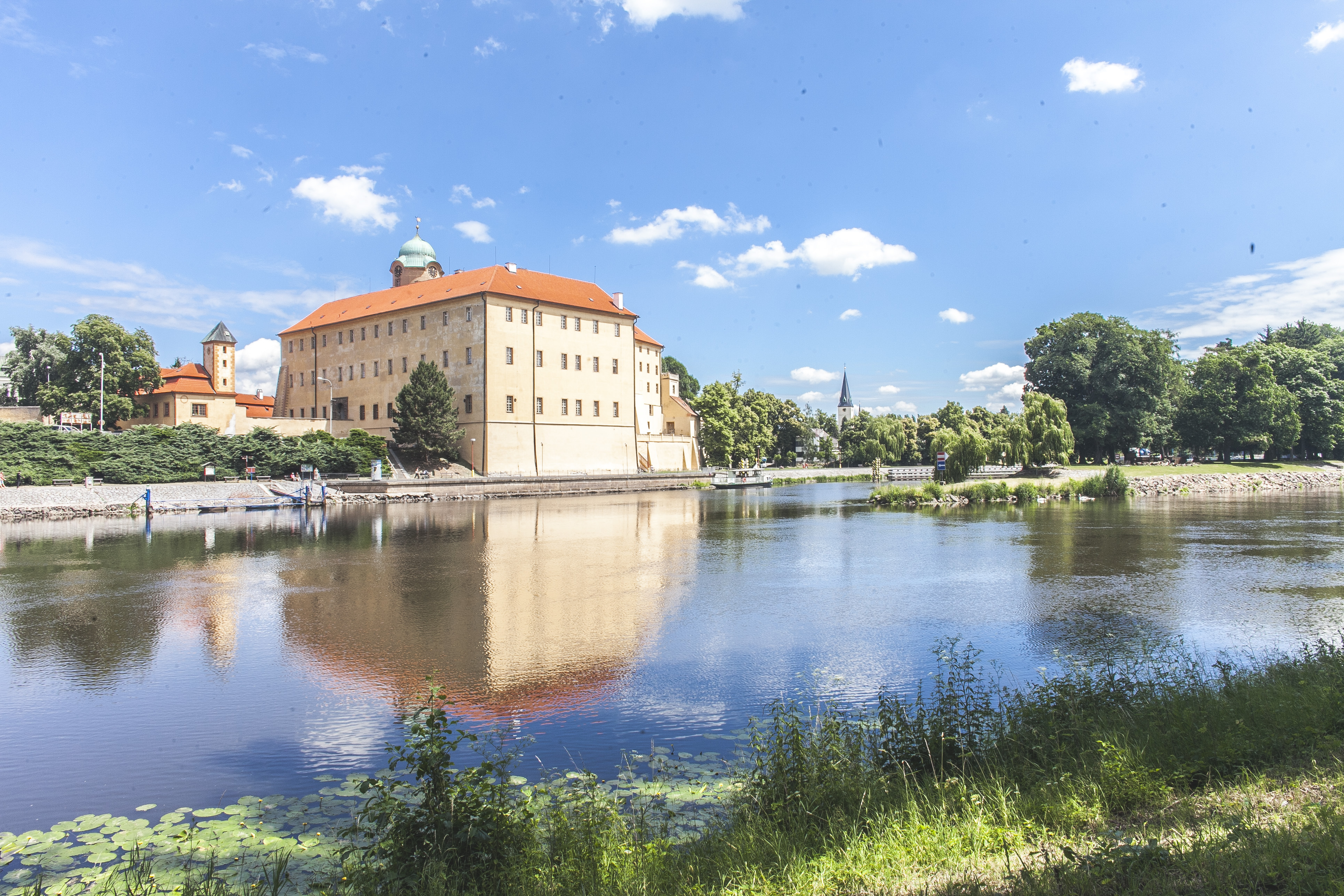 Учебный центр Подебрады находится в замке. Фото: Дита Хавранкова